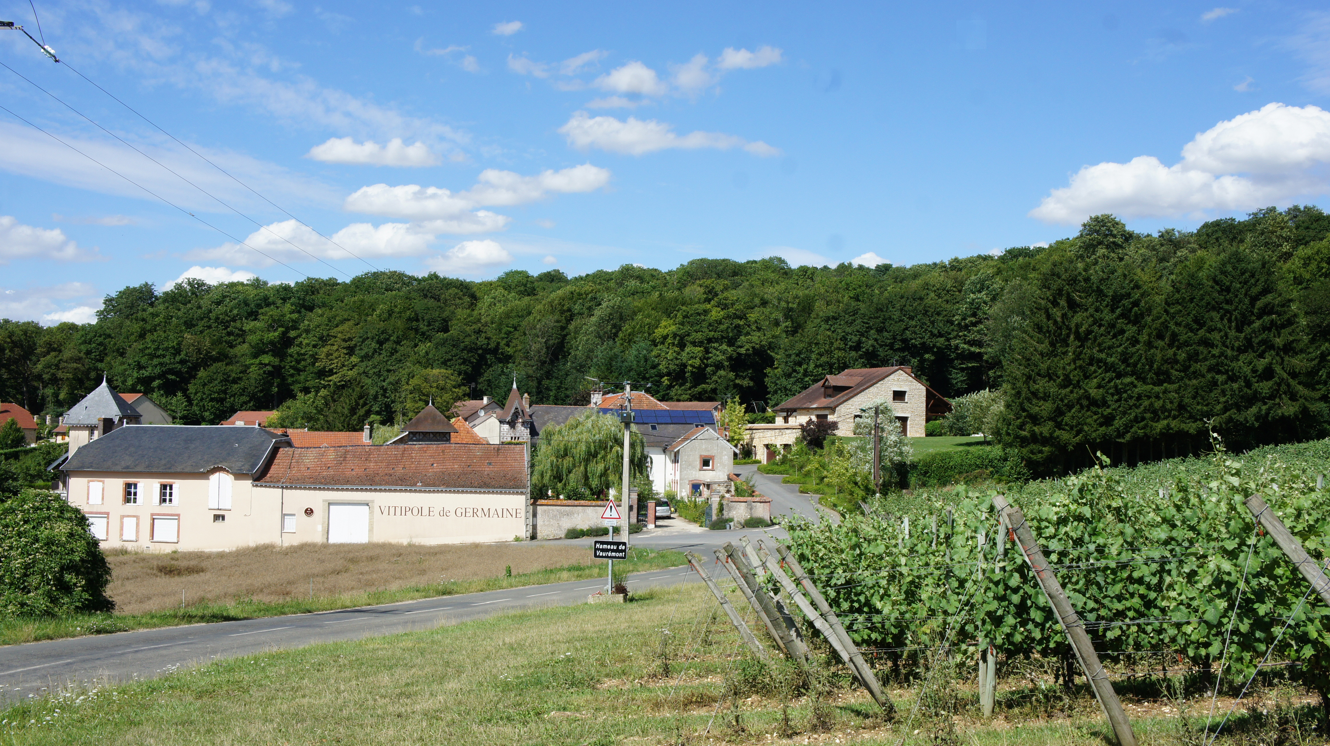 Vue du hameau de Vaurémont et de l'annexe Moët.